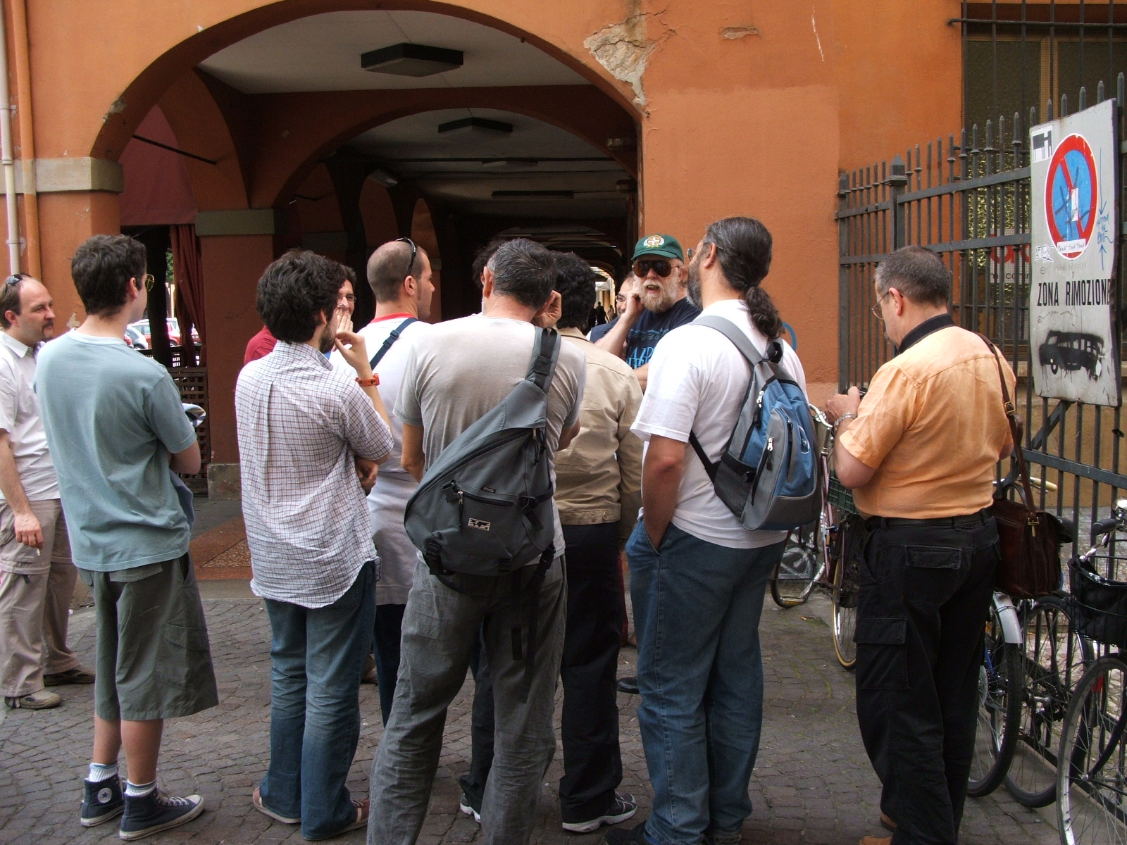 Wikiraduno Bologna 2006 - briefing dei wikipediani in Via Augusto Righi: da dove veniamo? dove andiamo? Soprattutto: chi siamo? ...